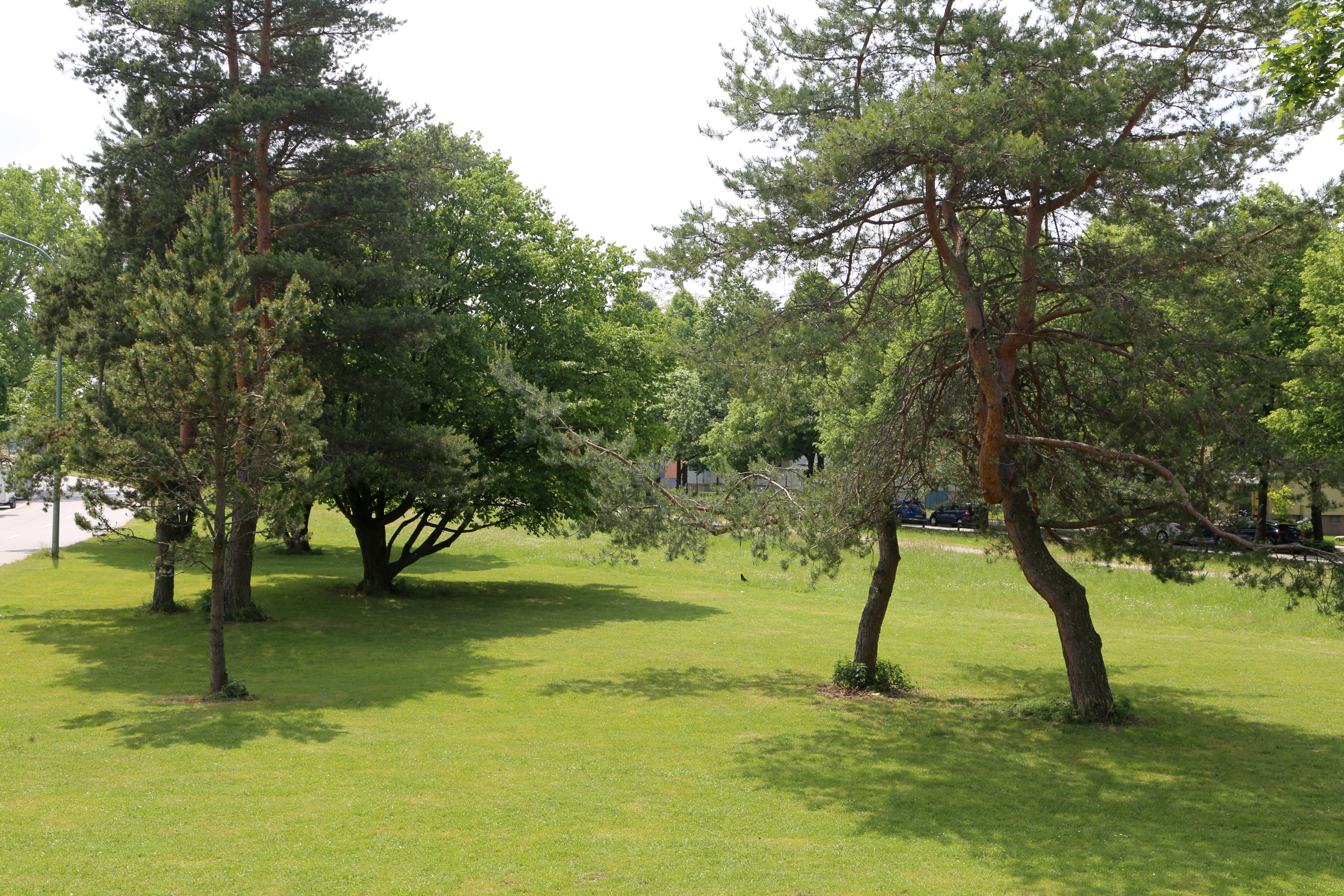 Goldschmiedplatz, Hasenbergl, München